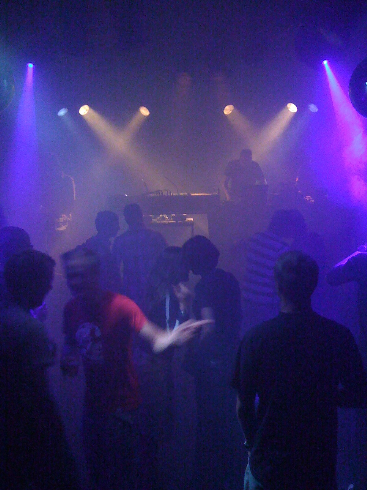 ACU, Utrecht, NL.